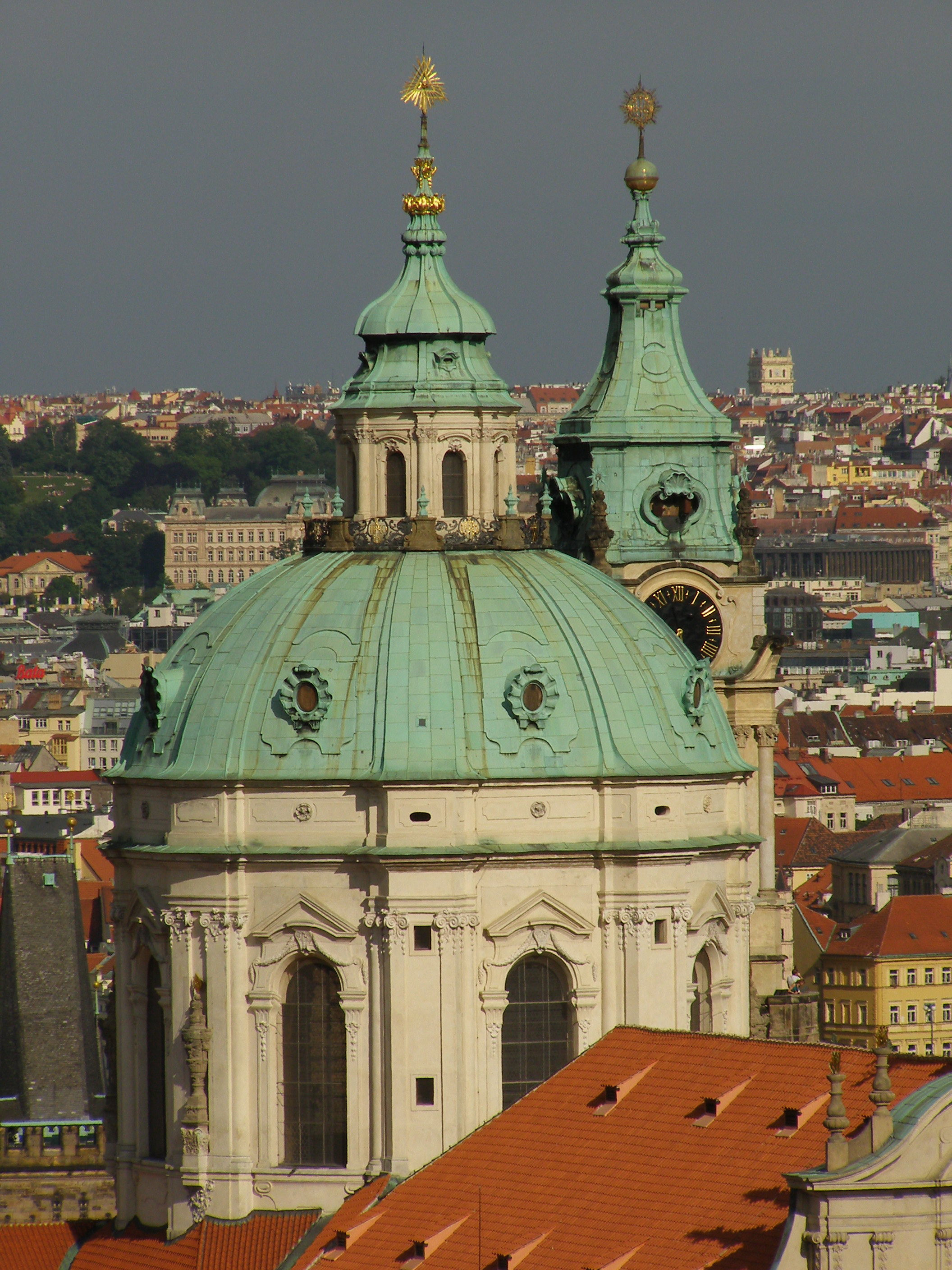 Jezuitský klášter s kostelem svatého Mikuláše a zvonicí (Malá Strana), Praha 1-Malá Strana, Malostranské náměstí 2/25, 556/29